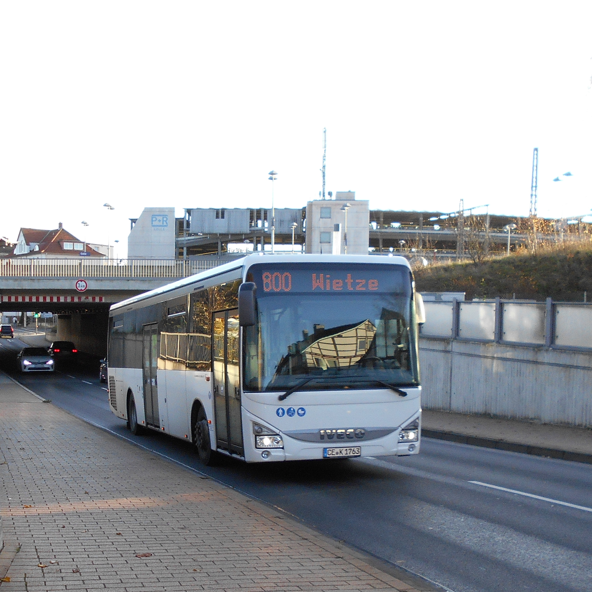 Einer der von der CeBus neu beschafften Iveco Crossway LE. Bus 1763 auf der Linie 800 kurz hinter dem celler Bahnhof.